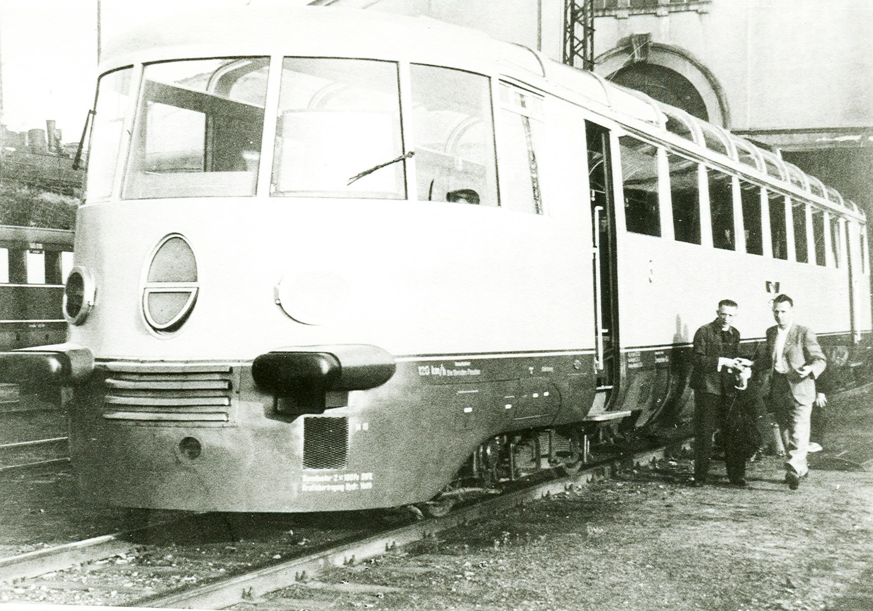 VT 137 463 im Bahnbetriebswerk Dresden-Pieschen auf einer historischen Fotografie von Georg Otte